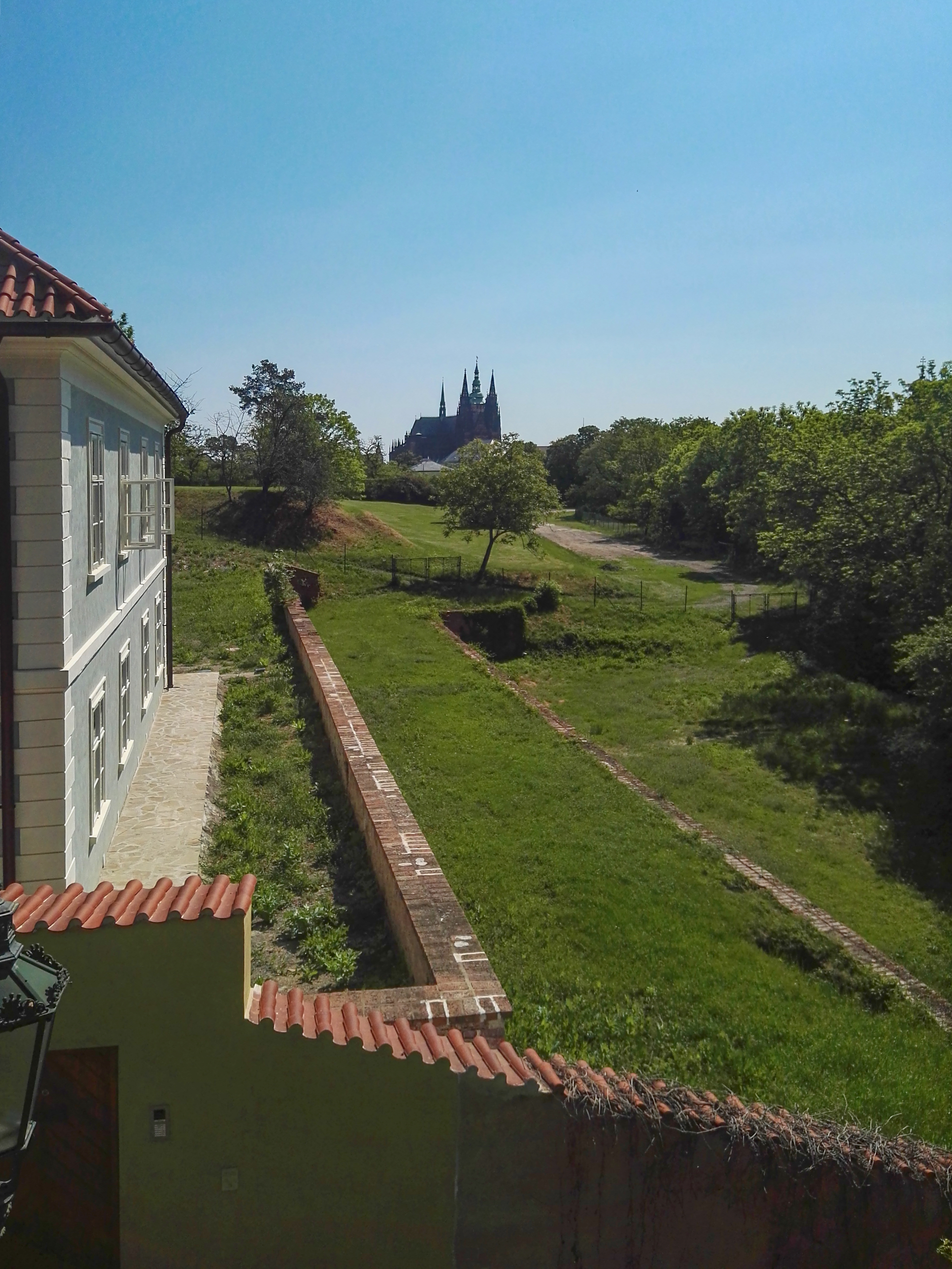 Horní Lumbeho zahrada v Praze, pohled od západu